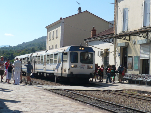 Rame X 97050 prête au départ pour Bastia en Gare de Corté